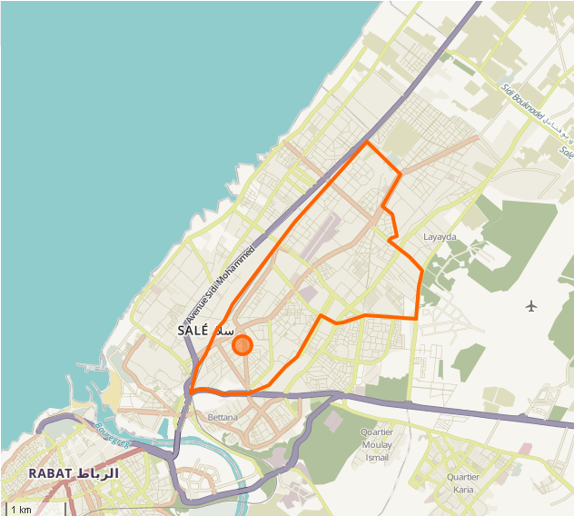 Carte de Tabriquet, Salé, Maroc. Limites géographiques de la carte : N : 34.1061 E : -6.8469 W : -6.6807 S : 33.926